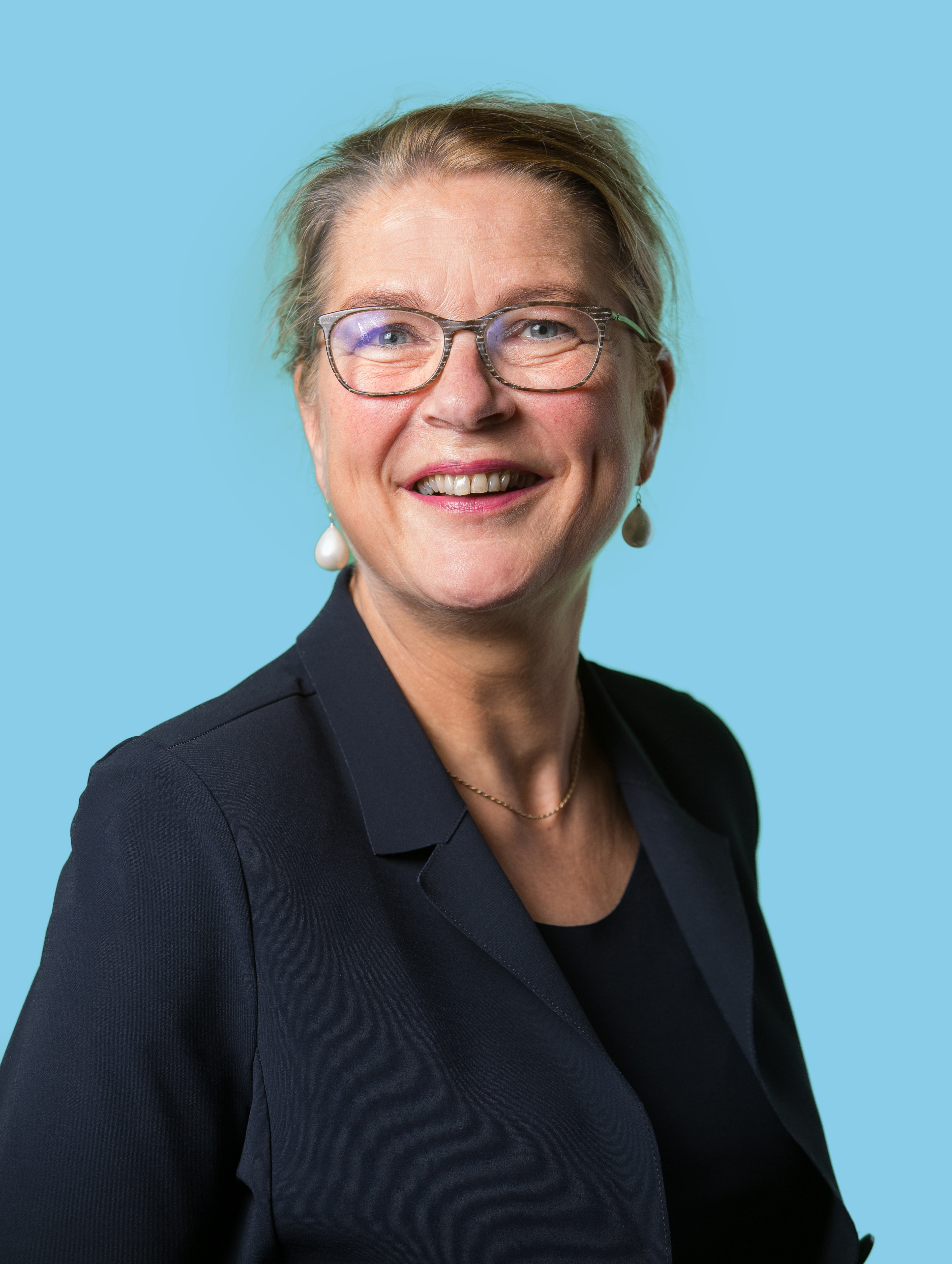 22 november 2016. Tweede Kamerlid voor de Partij van de Arbeid. Foto: Lex Draijer.